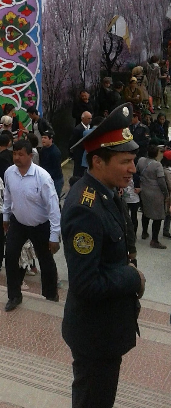 Праздник "Навруз" в г. Пенджикенте. Таджикистан, март 2018г.